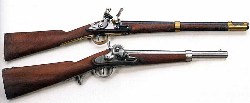 lovassági karabélyok